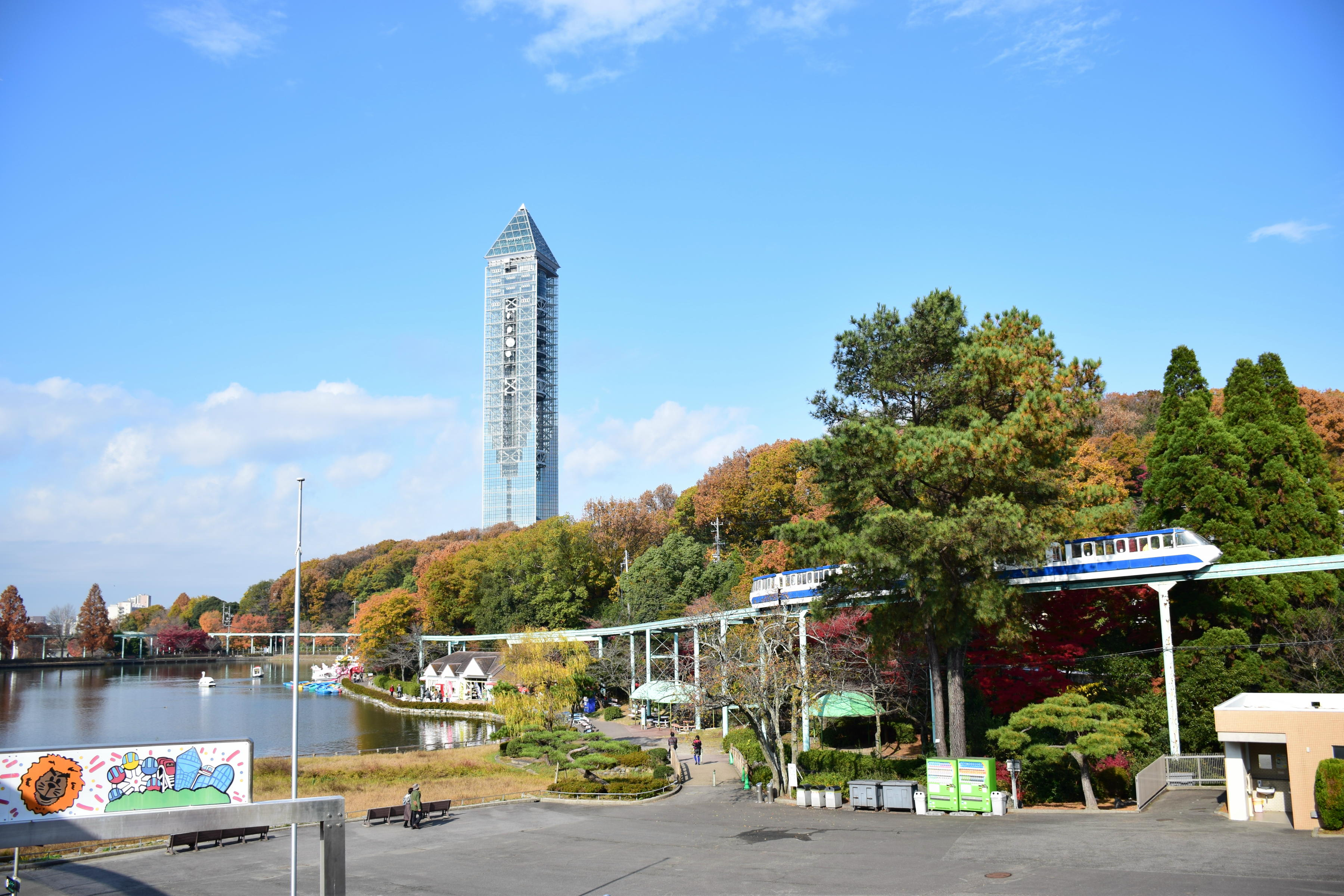 東山スカイタワー